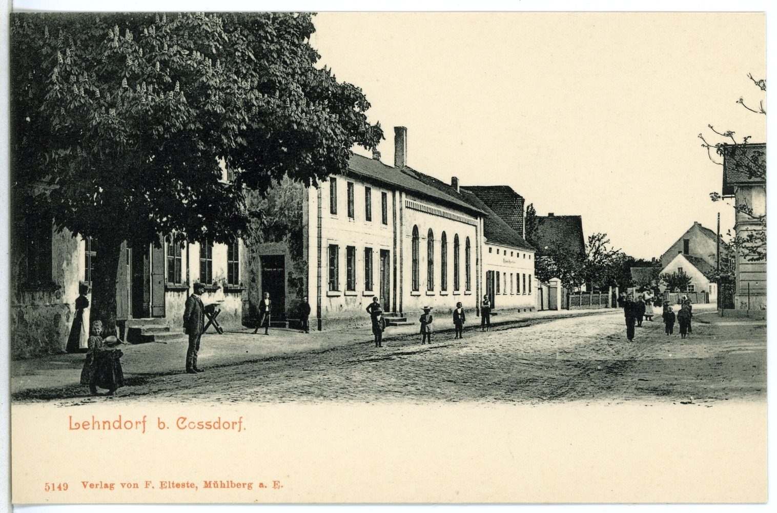 Lehndorf; Dorfstraße Diese Ansichtskarte stammt vom Kunstverlag Brück & Sohn aus Meißen ( Die Karte hat die eindeutige Nummer 05149 und ist in höherer Auflösung beim Verlag erhältlich. Sie wurde im Rahmen einer Kooperation zwischen Wikipedianern und dem Kunstverlag für Wikimedia Commons zur Verfügung gestellt.